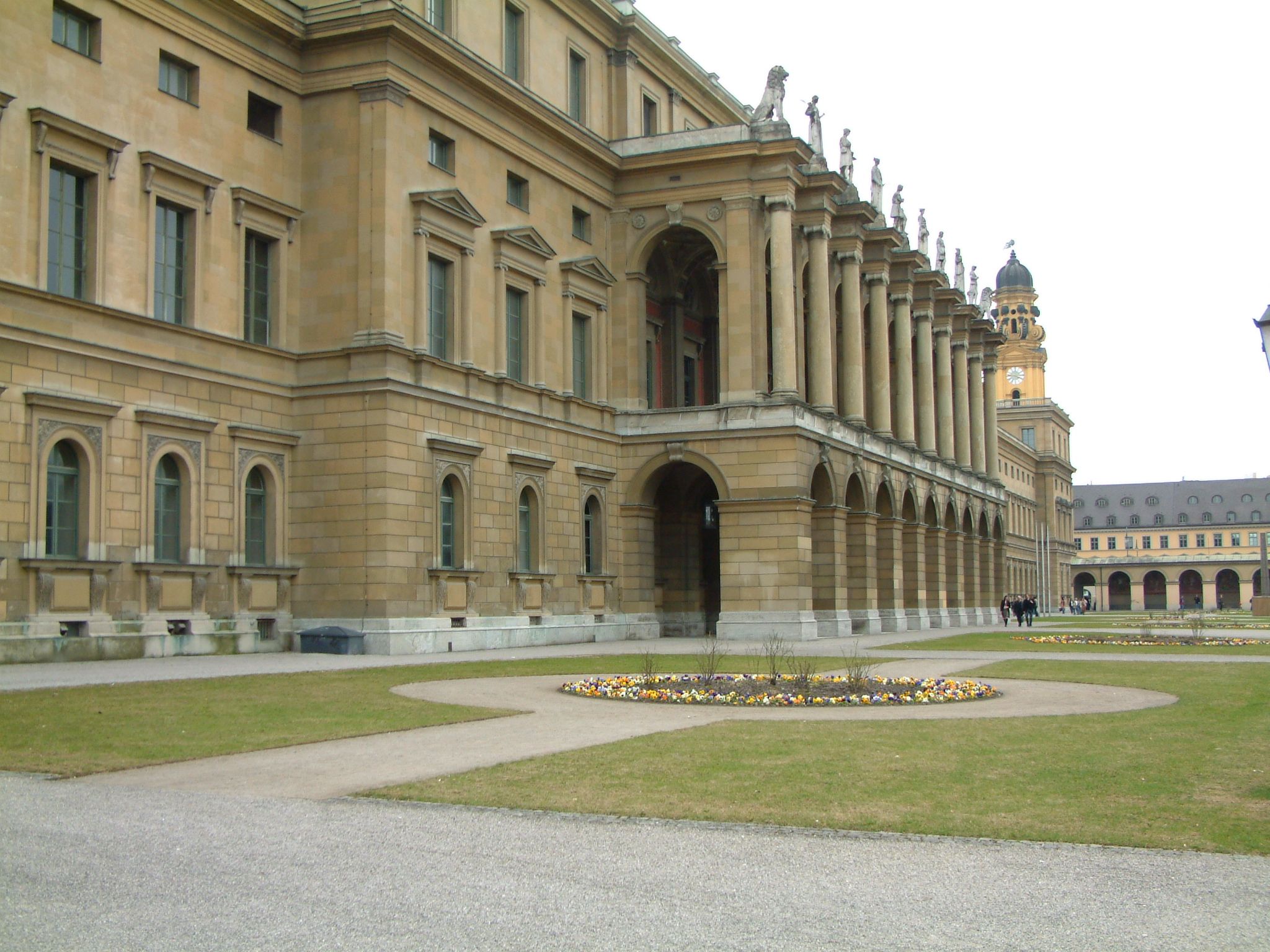 Residenz München, Bayern, Deutschland.